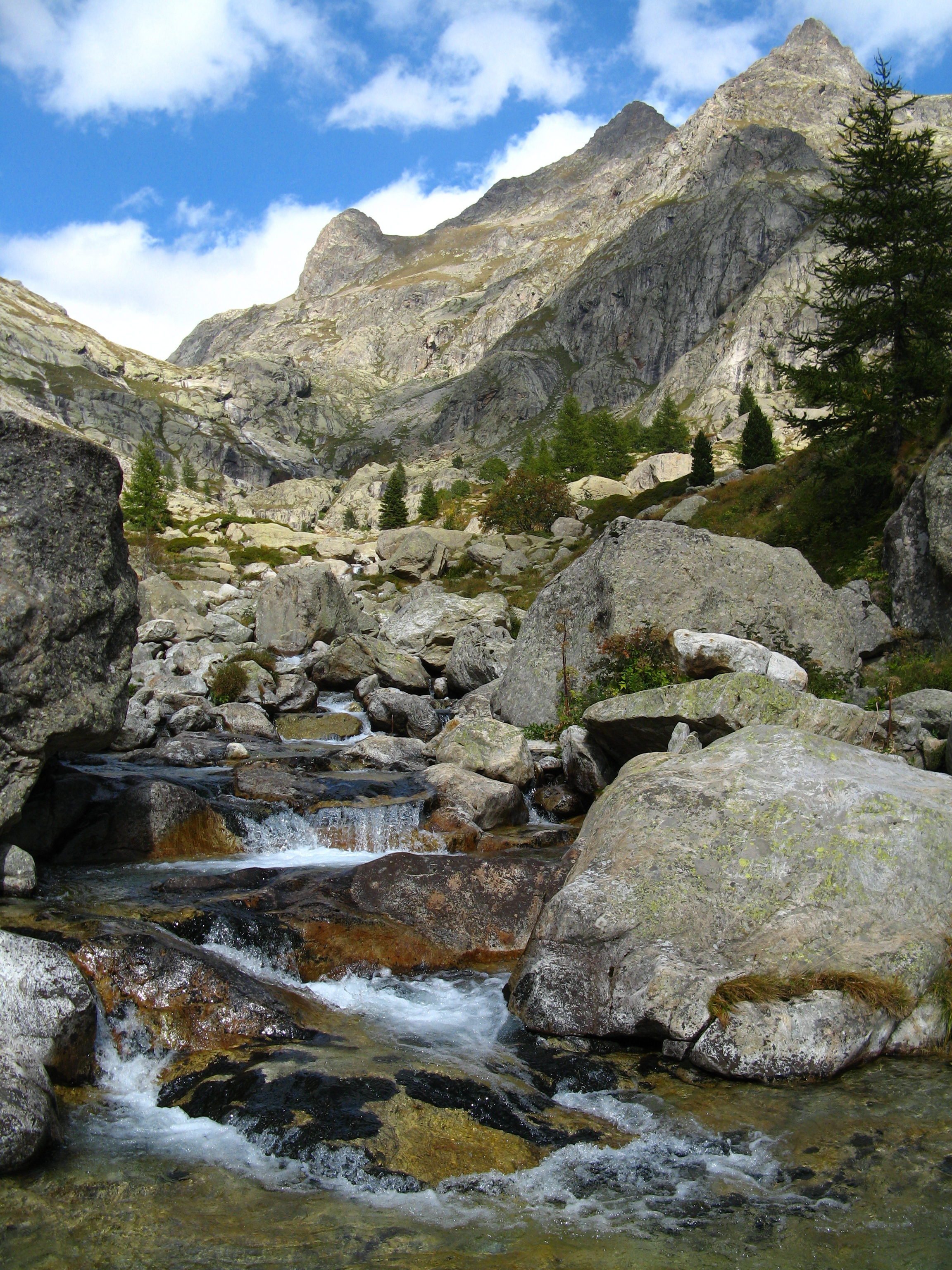 La Gordolasque, à l'entrée du Parc National du Mercantour (Alpes-Maritimes)